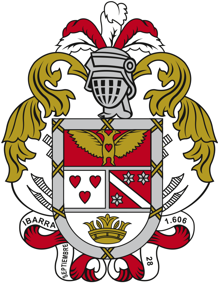 Blasón oficial del cantón Ibarra